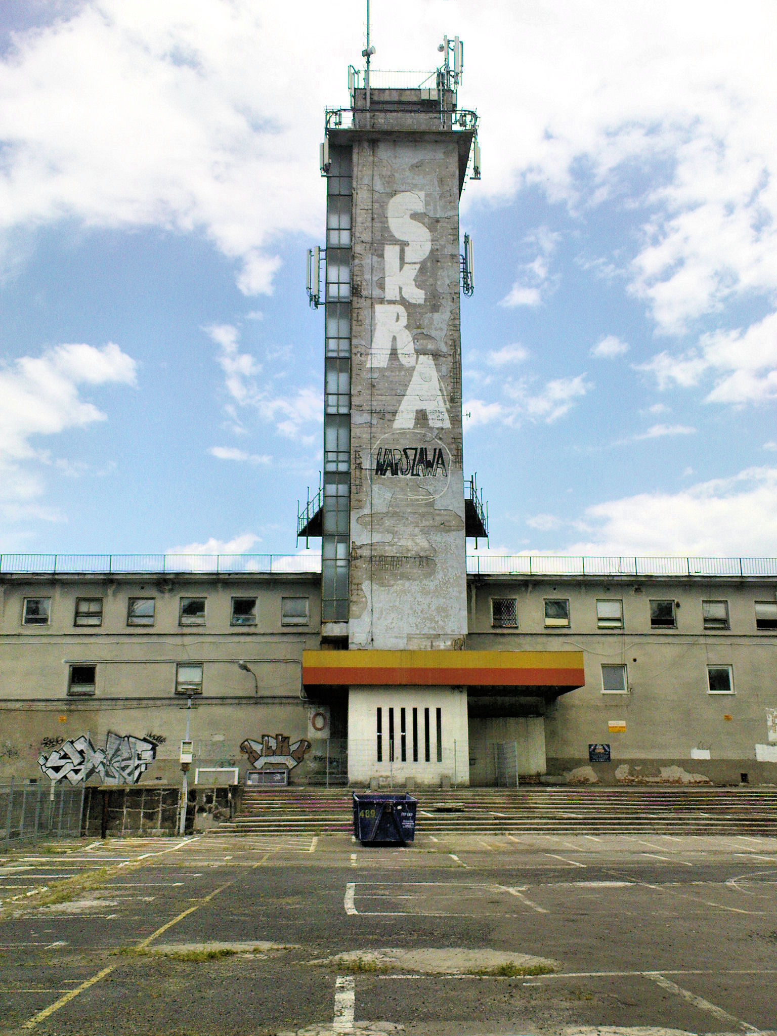 Dzień dzisiejszy obiektów stadionu "SKRA" w Warszawie